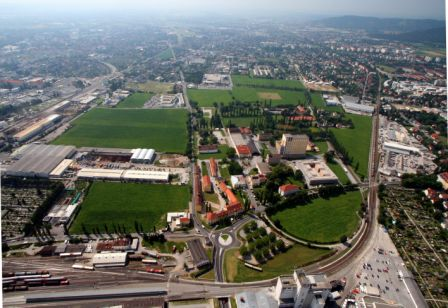 Graz-Reininghaus, Graz; Luftbild, Blick entlang Alte Poststraße Richtung Süd